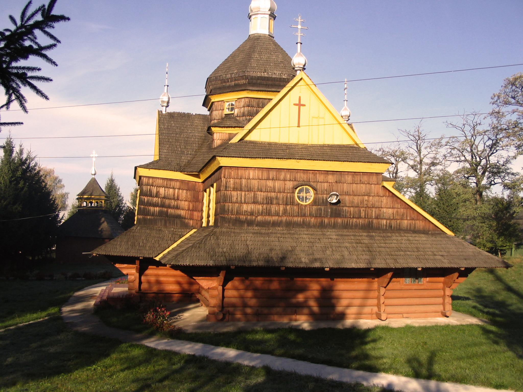 Церква в селі Устя (Снятинського району)